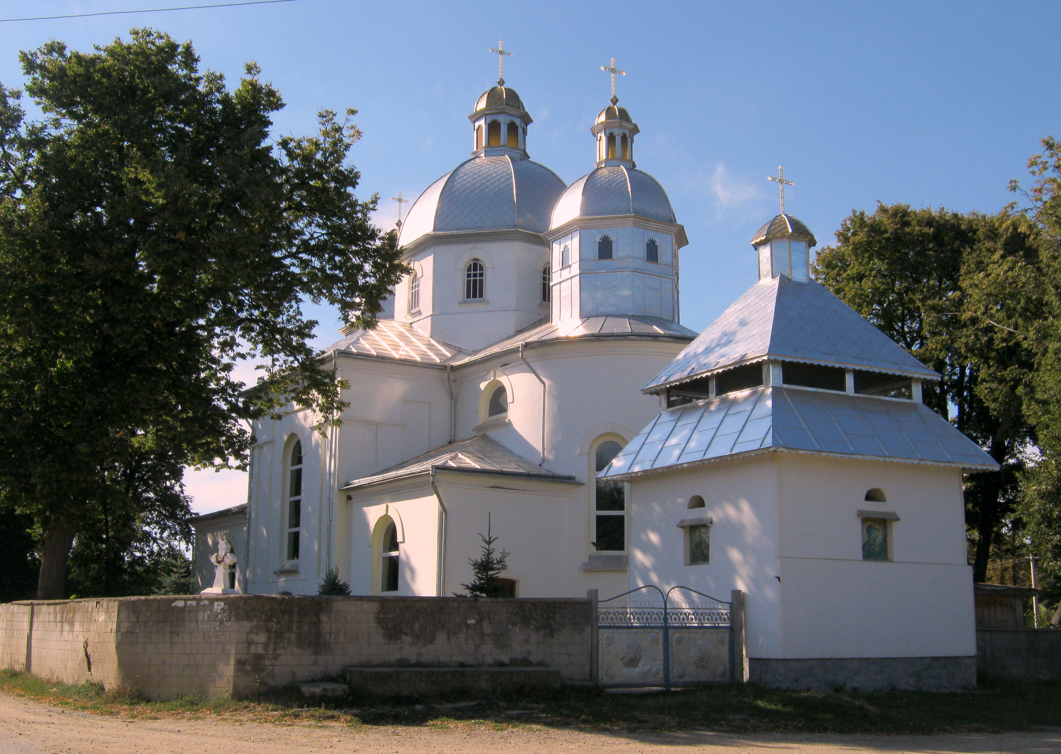 Церква Успіння Пресвятої Діви Марії у селі Колодрібка Заліщицького району Тернопільської області